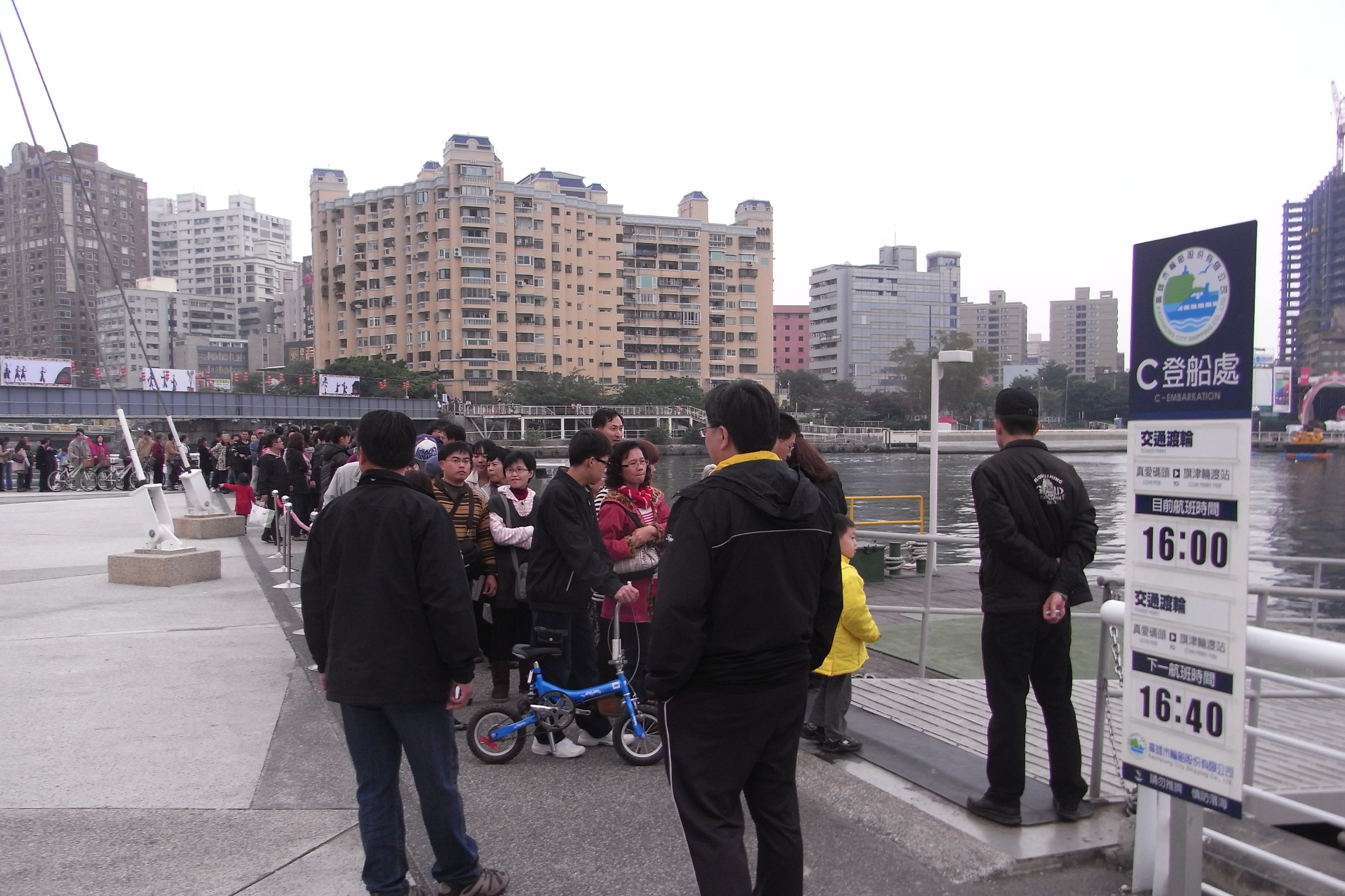 高雄市輪船公司真愛碼頭交通渡輪登船處C。